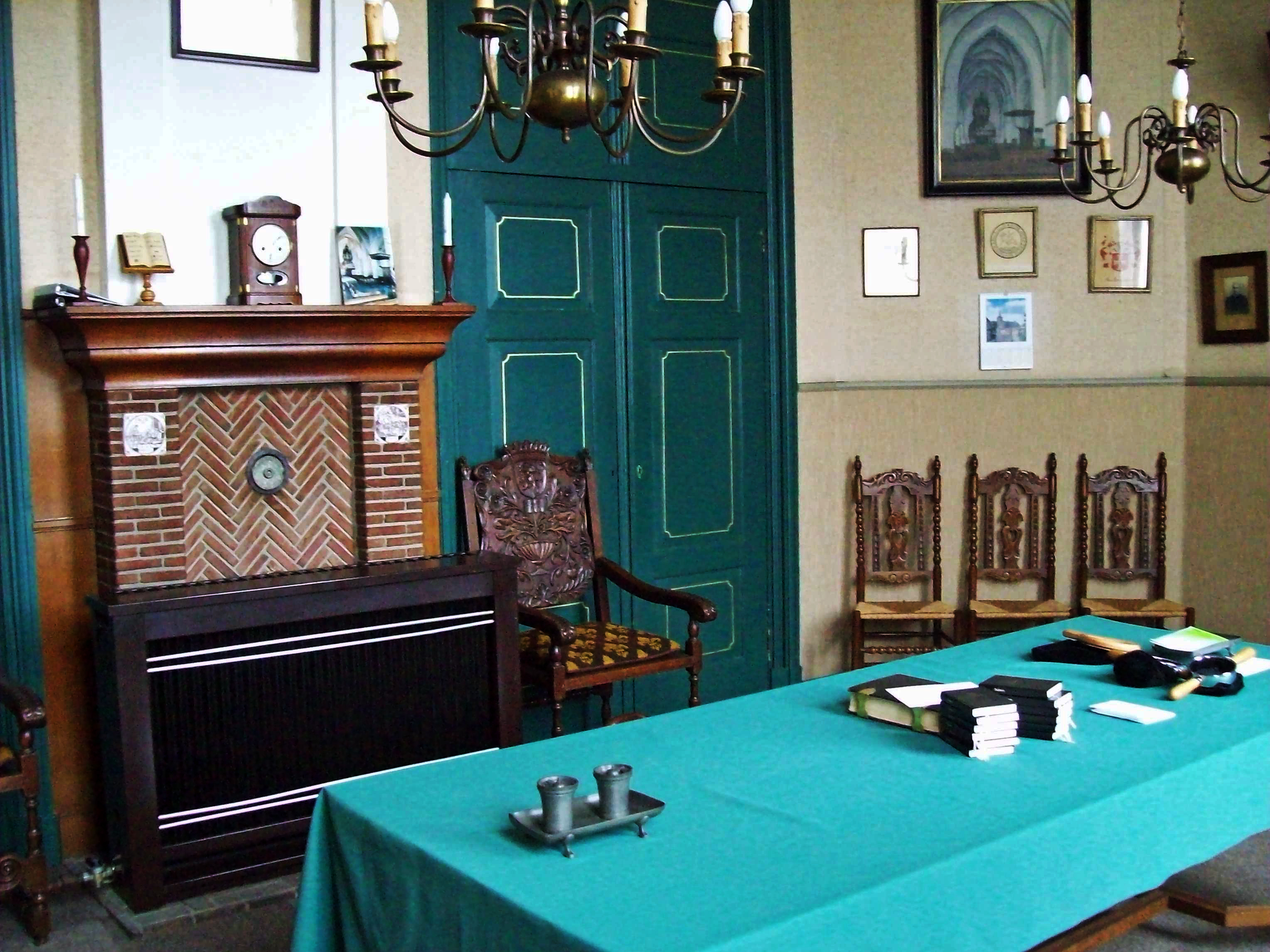 De consistoriekamer van de Grote Kerk te Nijkerk